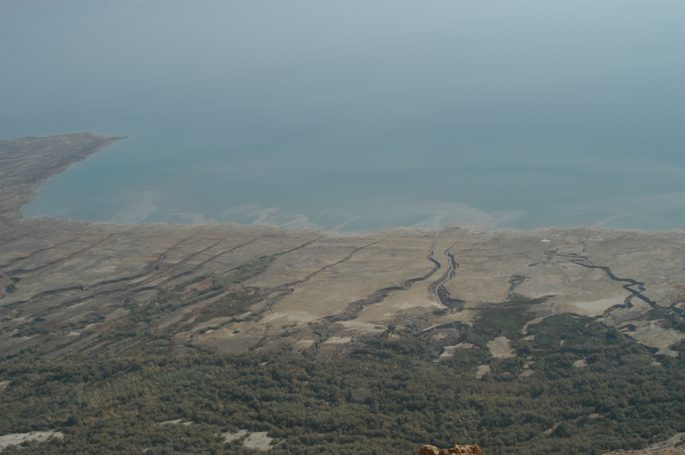 תמונה מאחד הצוקים שנמצא ממש מעל עינות צוקים